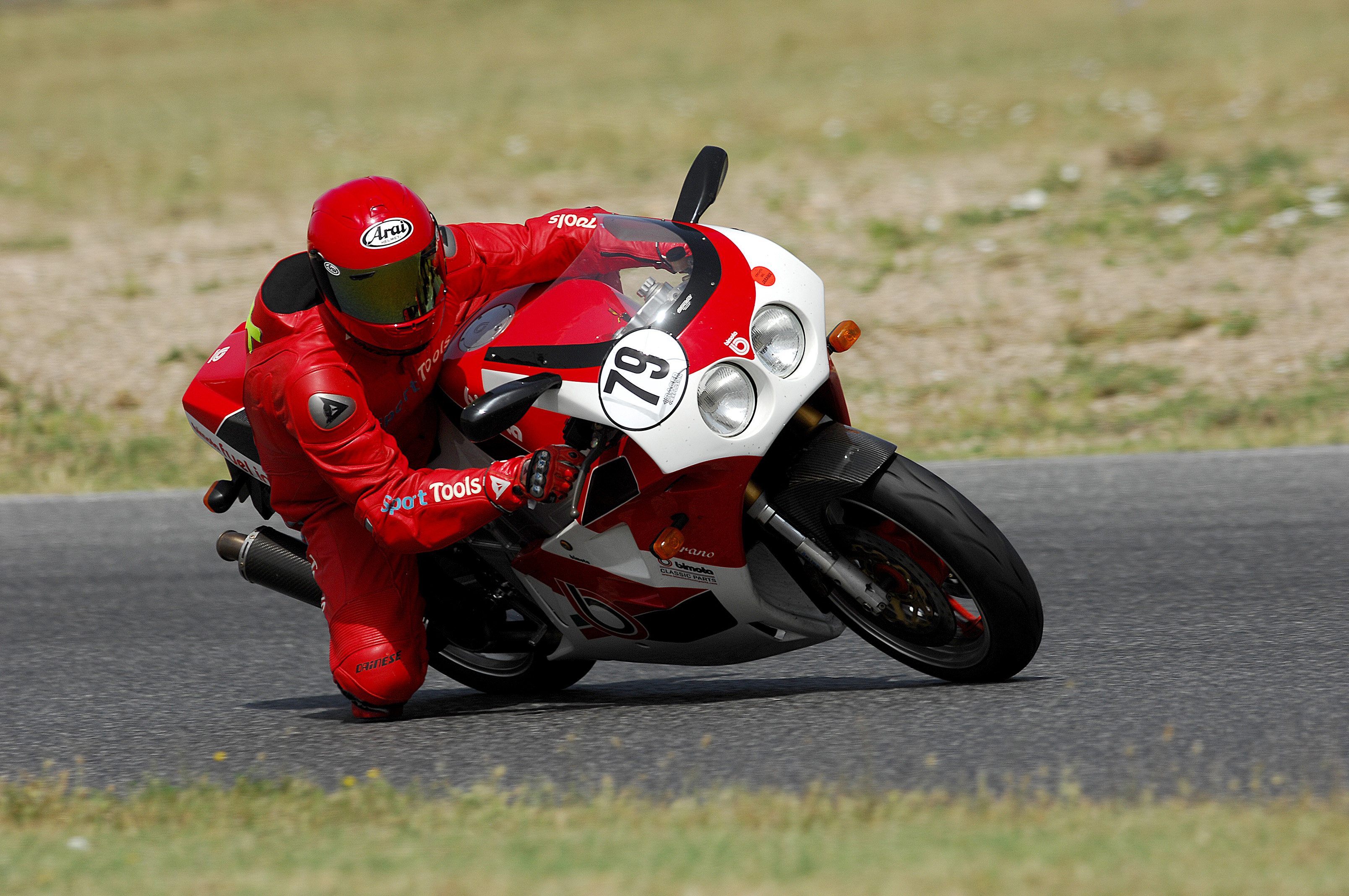 Bimota Furano. Una de las 152 unidades fabricadas entre 1992 y 1993. Motor Yamaha 1002 cc. 164 cv. Tercera evolución del modelo YB8 de esta marca artesanal italiana.